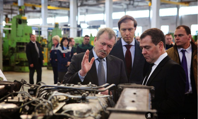 Д.А. Медведев. с генеральным директором ТМЗ Виталием Грибановым.